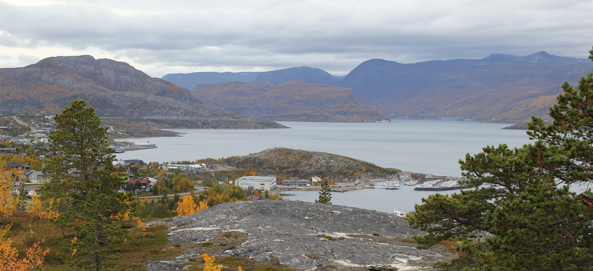 Komsa skole har helt fantastiske uteomgivelser. Altafjorden i bakgrunnen.